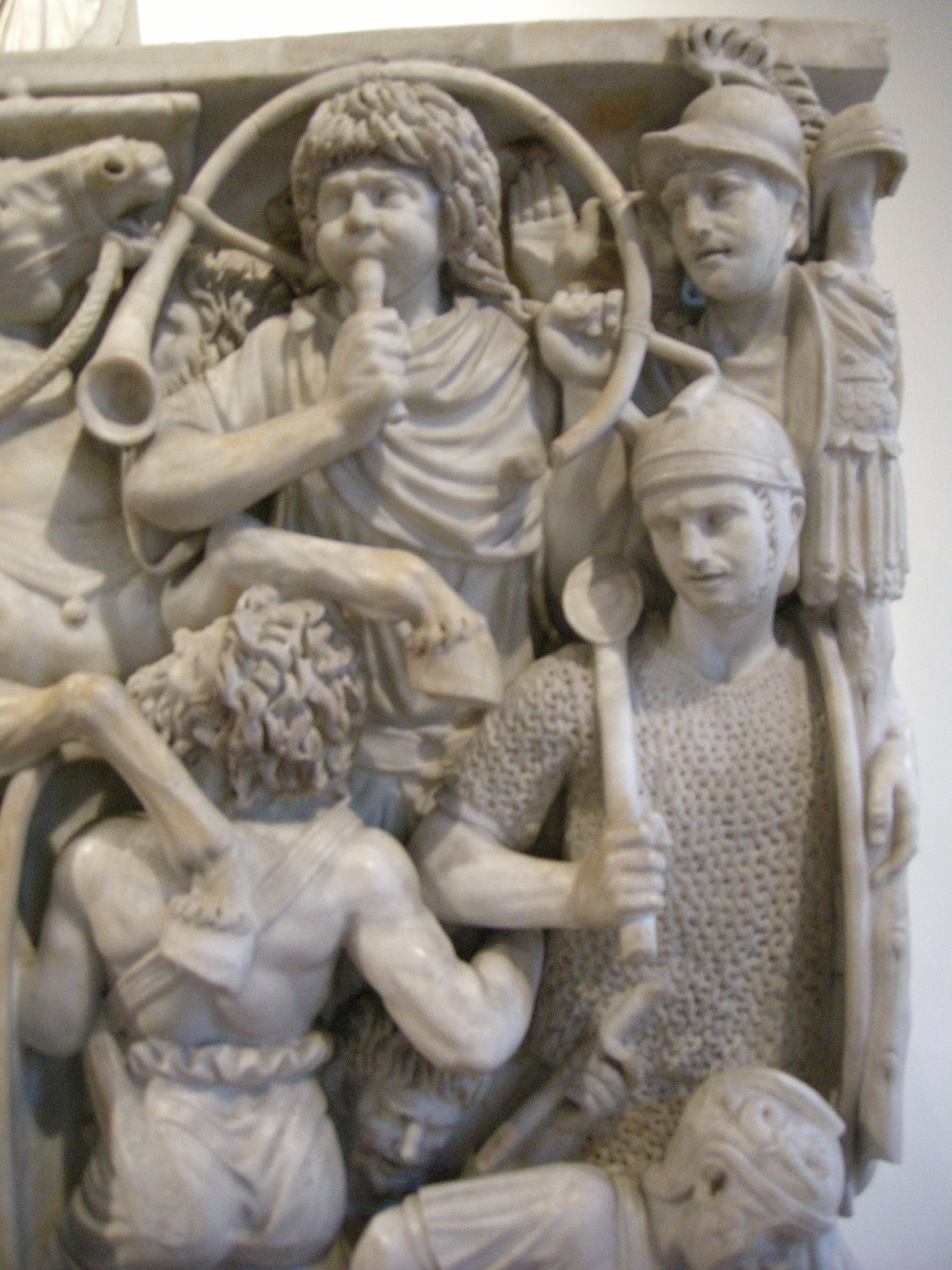 Grande Ludovisi sarcophagus